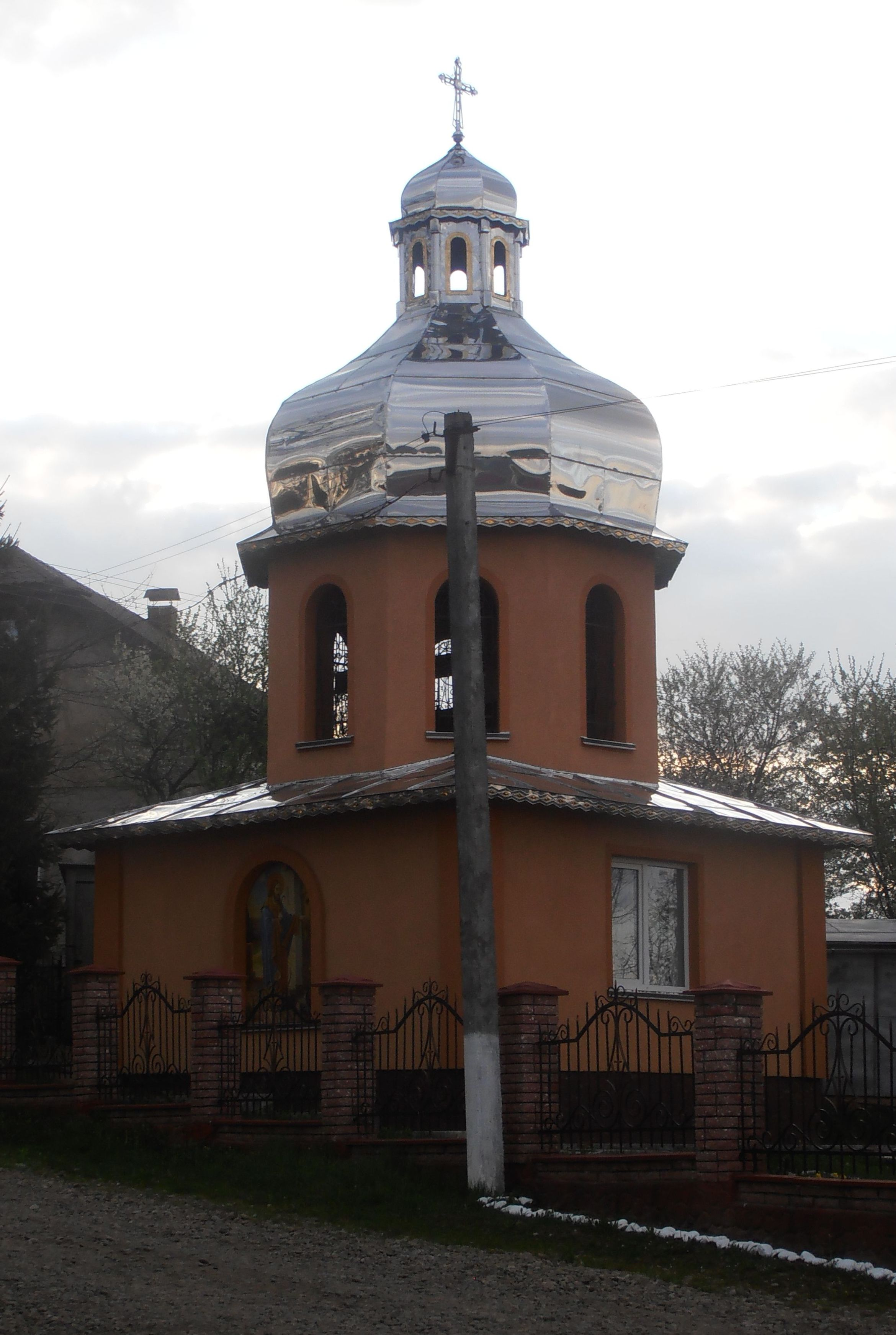 Дзвіниця церкви св. Йосафата